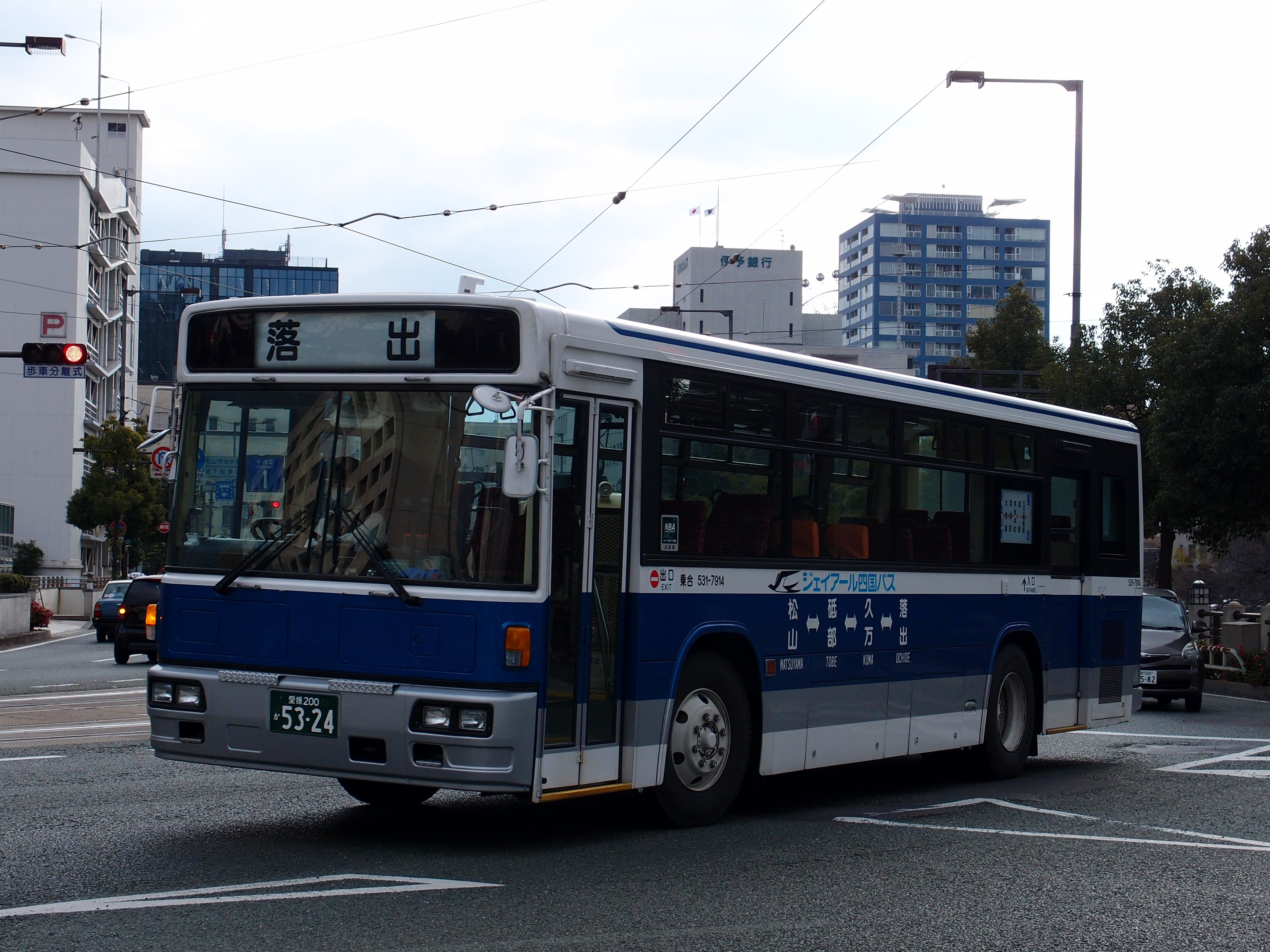 ジェイアール四国バス いすゞキュービック（KC-LV280L/西日本車体工業96MC架装） 大阪市交通局より転入